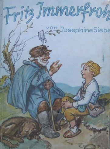 Buchumschlag zu Josefine Siebe: Käfer Immerfroh